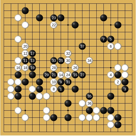 1960年5月30-31日 第15期本因坊戦挑戦手合七番勝負第4局 高川秀格-藤沢秀行(先番) 53-89手目